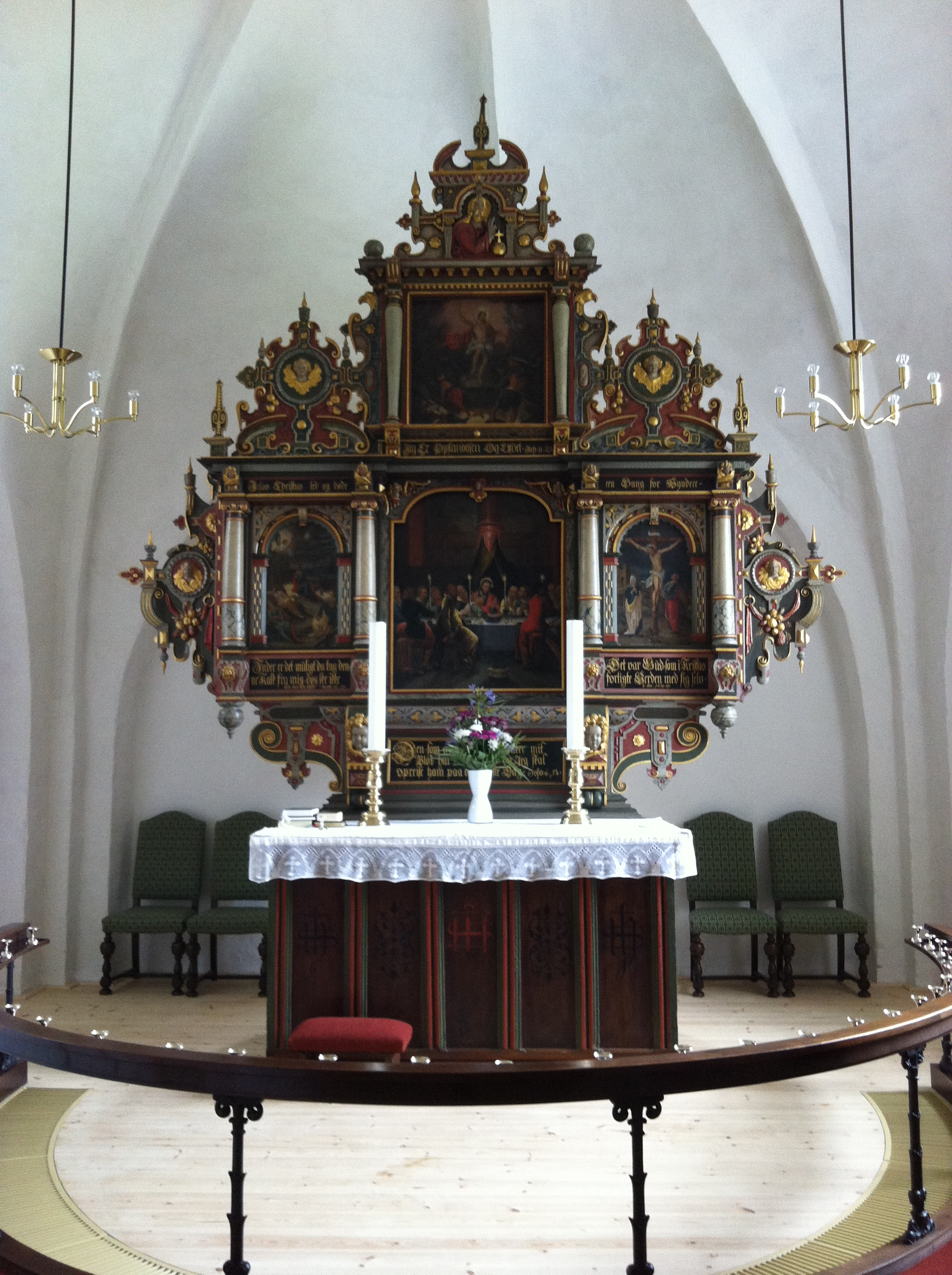 Altertavle fra Skærbæk kirke, 13. juli 2013.